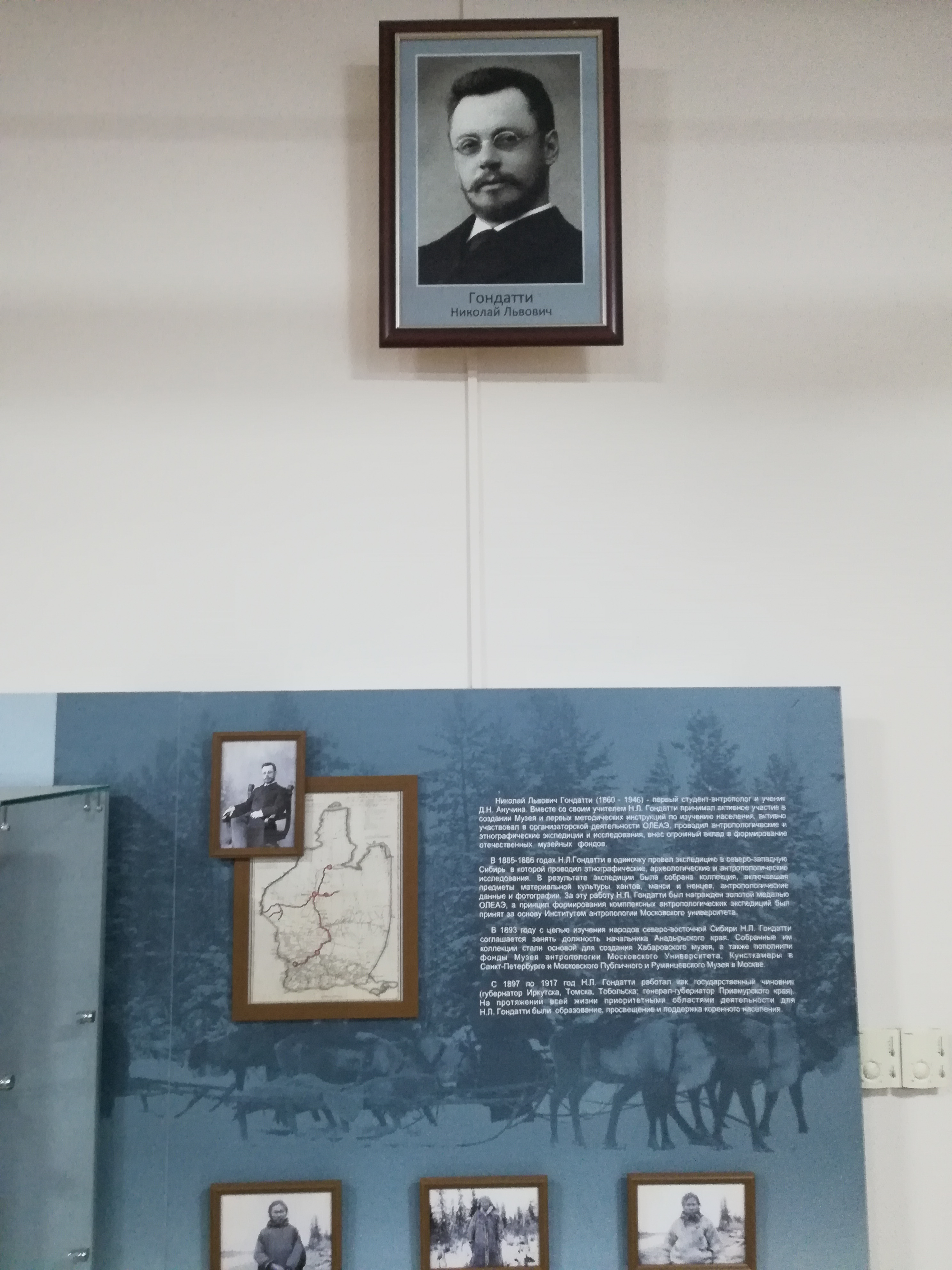 Портрет Гондатти